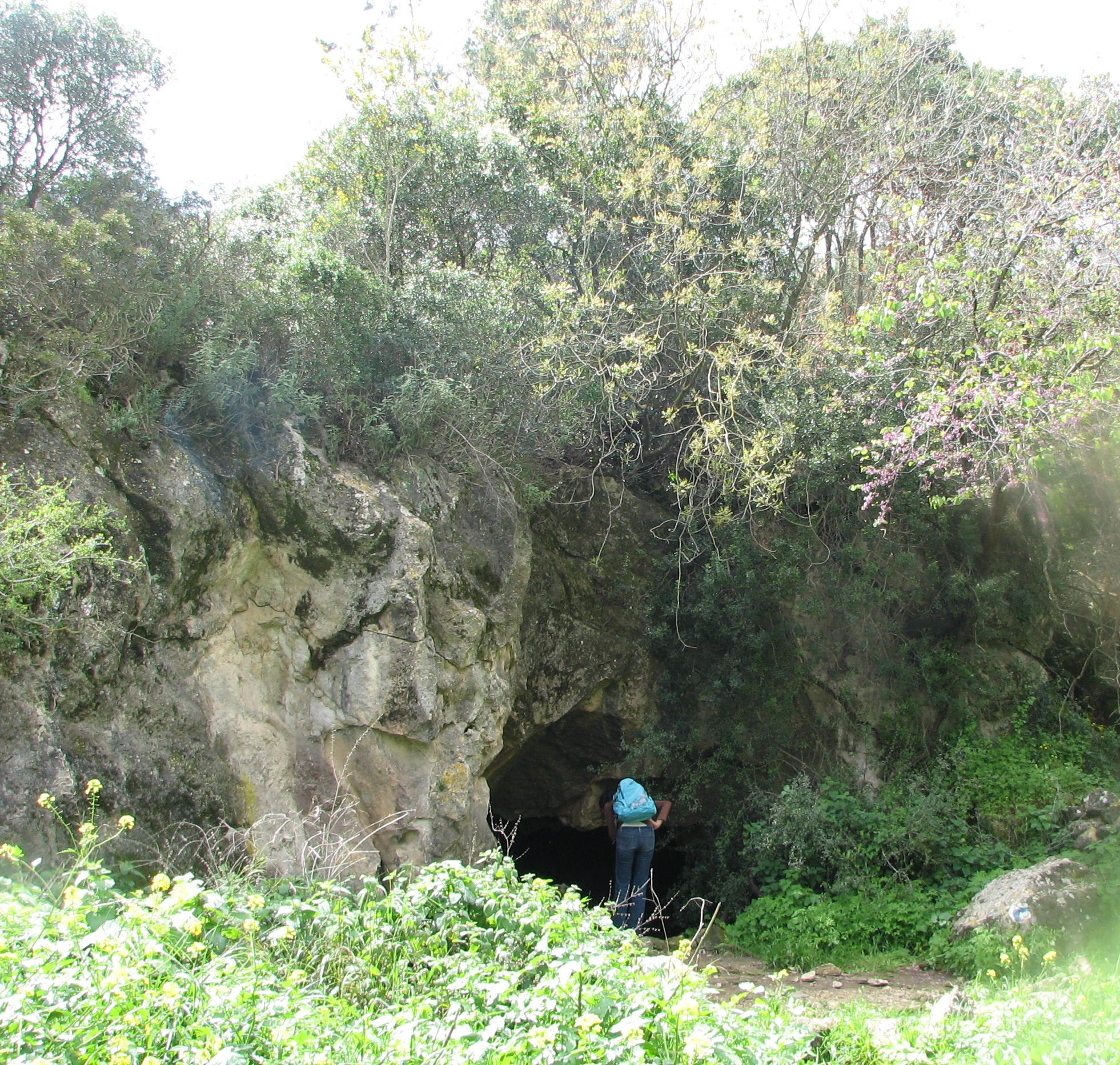 Park Nesher in the city Nesher on Mount Carmel, Israel. In the park there are 2 Suspension bridges, walking paths, Mediterranean forests, woodlands, scrub and flowers. A place for picnic, and playground. פארק נשר בעיר נשר ליד חיפה. הפארק שוכן בהר הכרמל. בפארק שני גשרים תלויים, חורש ים תיכוני, שפע פרחים, וחיות בר. בפארק אזור המיועד לפיקניק שולחנות וספסלים וכן מגרש משחקים לילדים. בואדי קטיע העובר בפארק מסלולי הליכה מסומנים העוברים בואדי ועל מורדותיו. ומערה פרהיסטורית. בפארק גם דרך העוברת על צלע ההר ישירות לגשרים, בה ניתן ללכת גם עם עגלות ילדים וכן ספסלי ישיבה ומרפסות תצפית. מהואדי ניתן לראות תצפיות על אוניברסיטת חיפה ועל שכונותיה של העיר נשר מערה פרהיסטורית בואדי קטיע